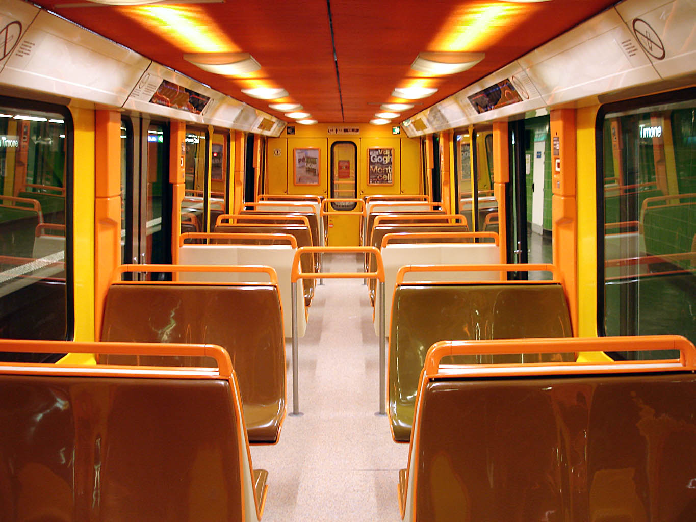 Intérieur d'une rame du métro de Marseille, France.